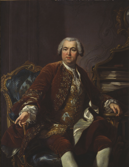 Nicolas Beaujon par Louis-Michel van Loo